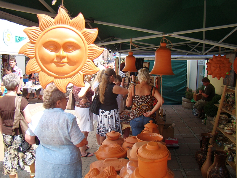 Die Ikonen der zeitgenössischen Volkskunst in Sanok.